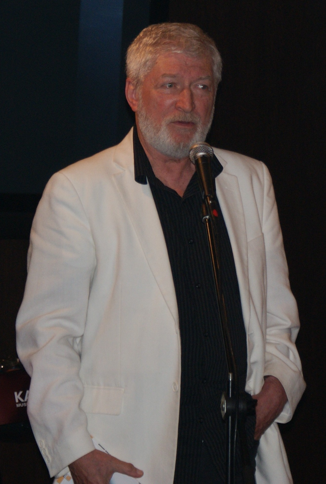 actor român